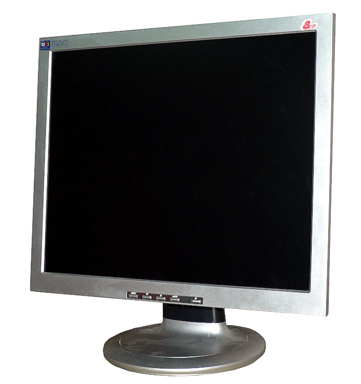 hardware lcd